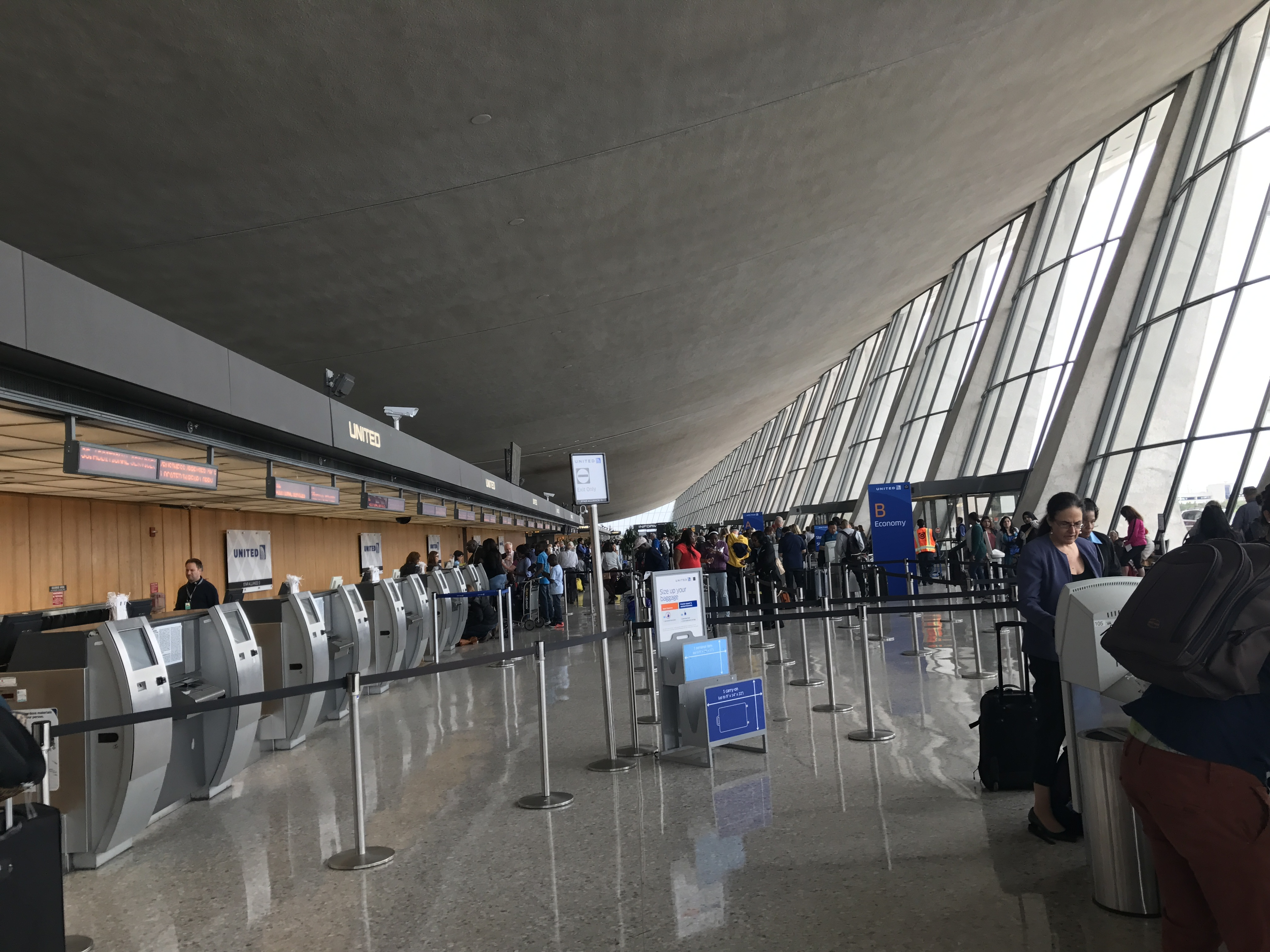 Zona de documentación del Aeropuerto Internacional de Washington Dulles.